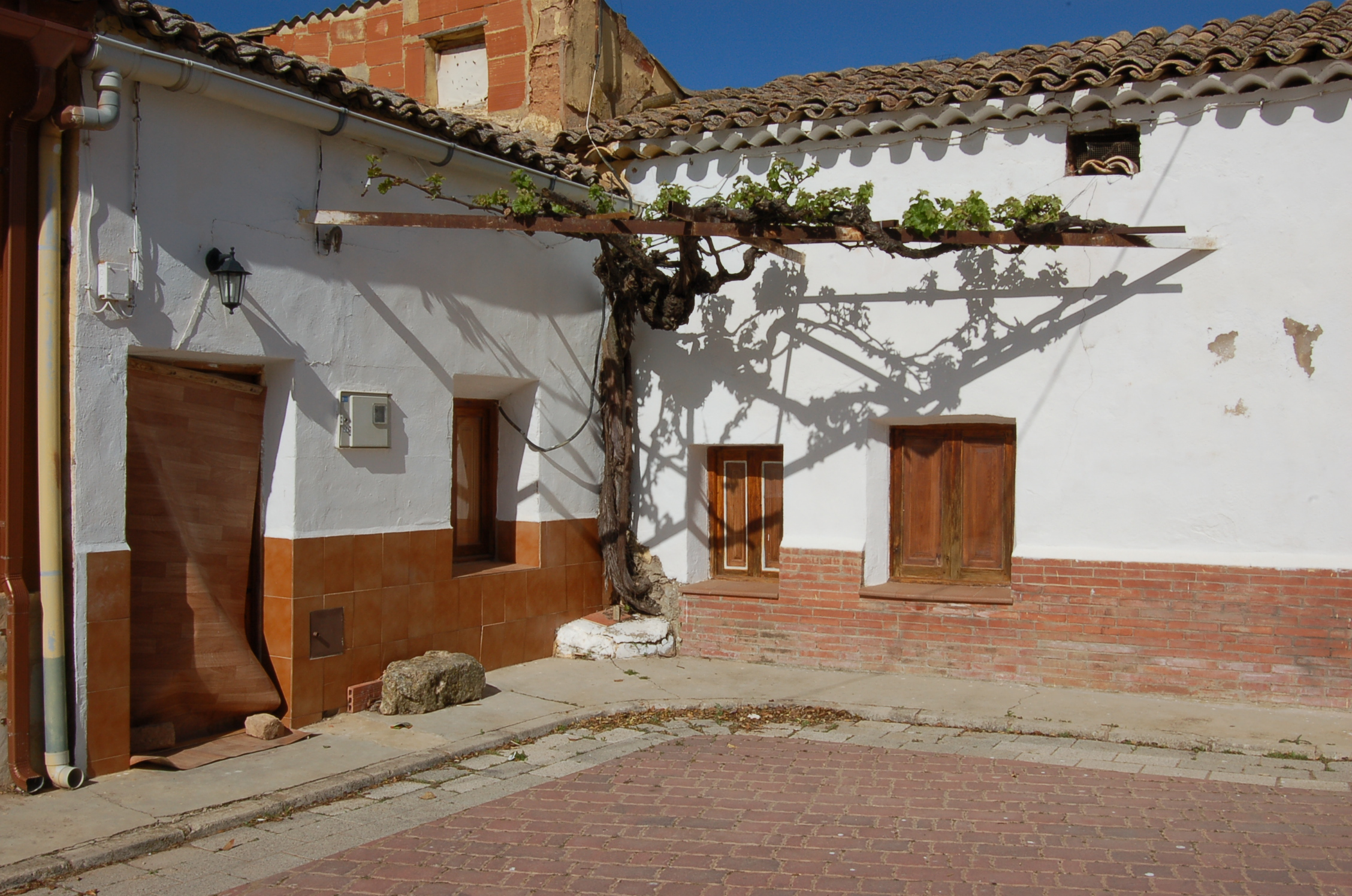 Parra en Hontecillas